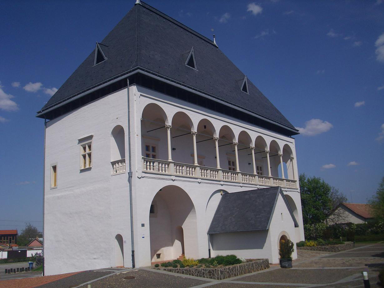 Báthory várkastély, Nyírbátor